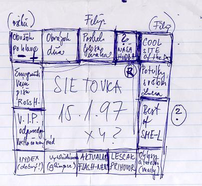 Náčrt prevej verzie internetového magazínu sieťovka, ktorý vzišiel zo stretnutia Jara Filipa, Ivana Leščáka (EUnet), Martina Vystavila (SANET), Jána Štrassera a Róberta Dydu.